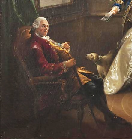 Baron Ludwig von Stein (1693-1780), natürlicher Sohn von Pfalzgraf Christian II. (Pfalz-Zweibrücken-Birkenfeld)